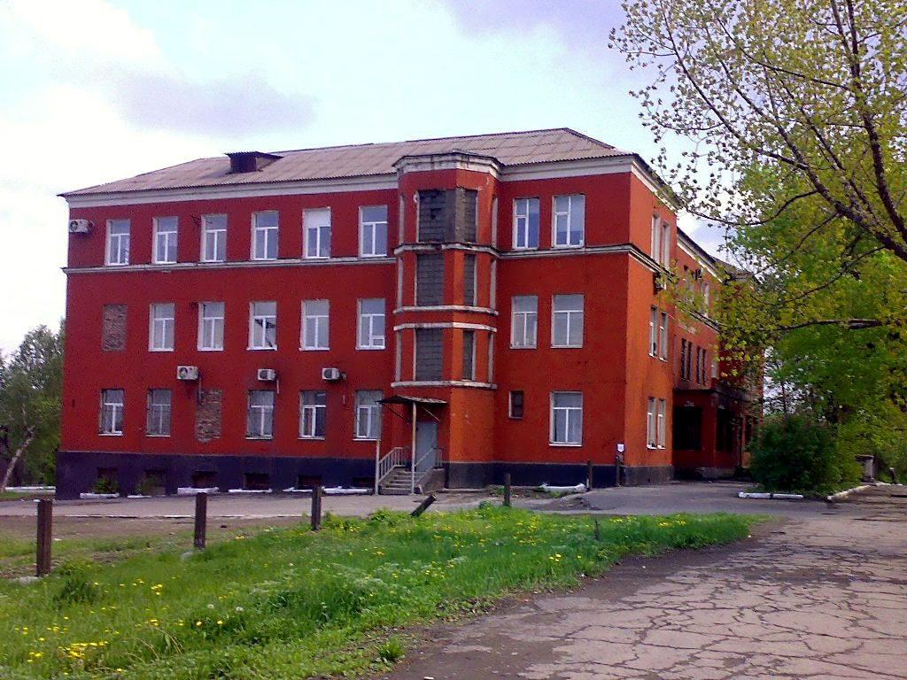 Будівля головного корпусу заводської лікарні, Алчевськ, вул. Кірова, 1